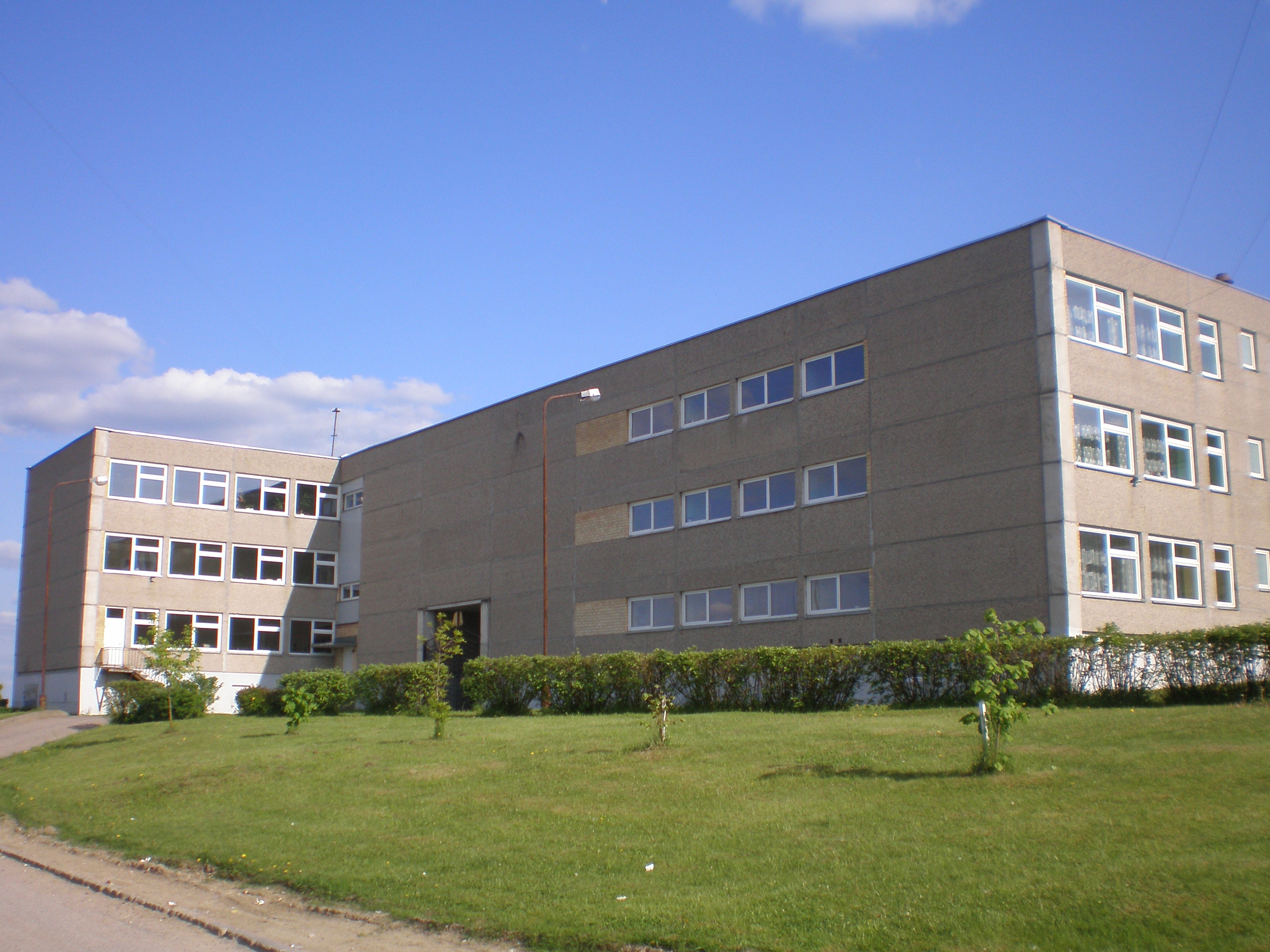 Jonavos Raimundo Samulevičiaus pagrindinė mokykla